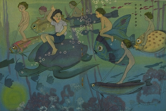 Page du magazine Kodomo no kuni, août 1930, illustration de Okamoto Kiichi (1888-1930)